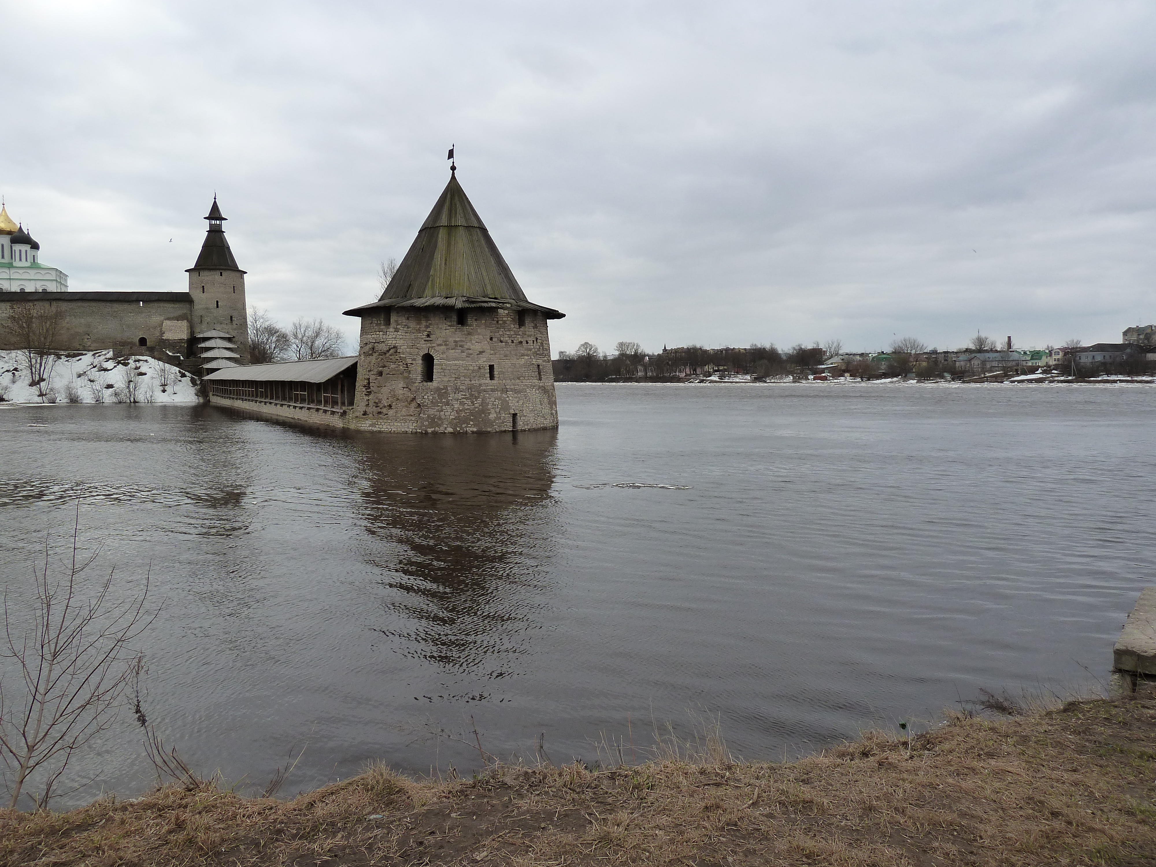 Плоская башня у Нижних решёток и башня Кутекрома Псковской крепости в период наводнения 9-10 апреля 2011